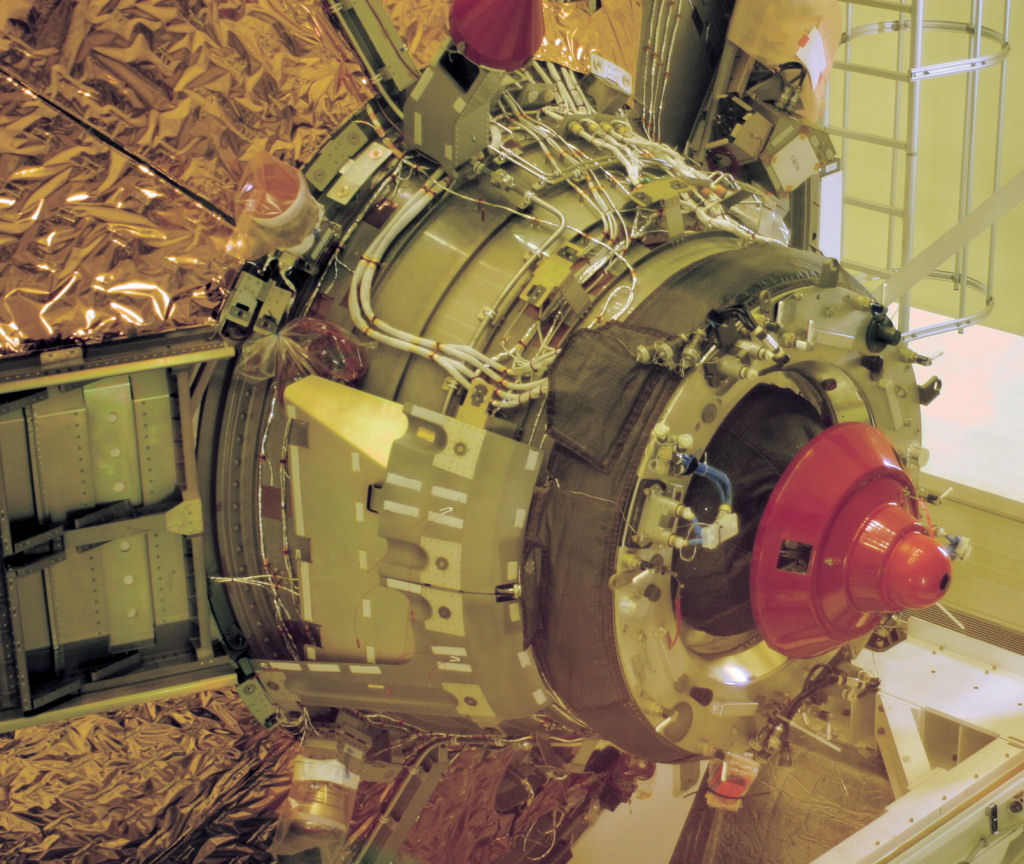 Dockingmechanismus des ATV Jules Verne